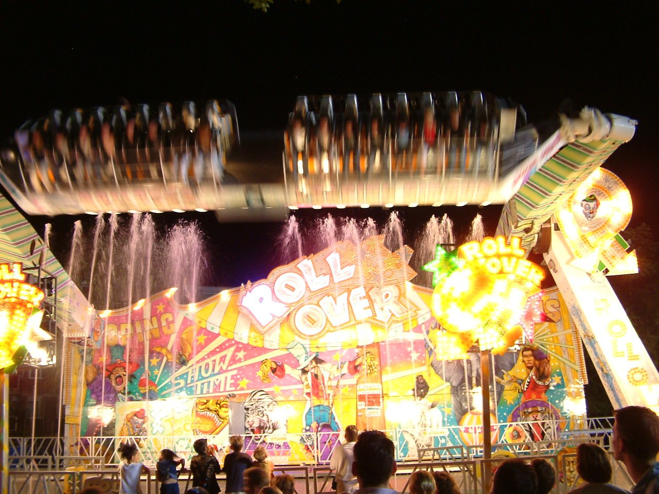 Park Hilaria (kermis in Eindhoven), attractie de roll over in 2003.